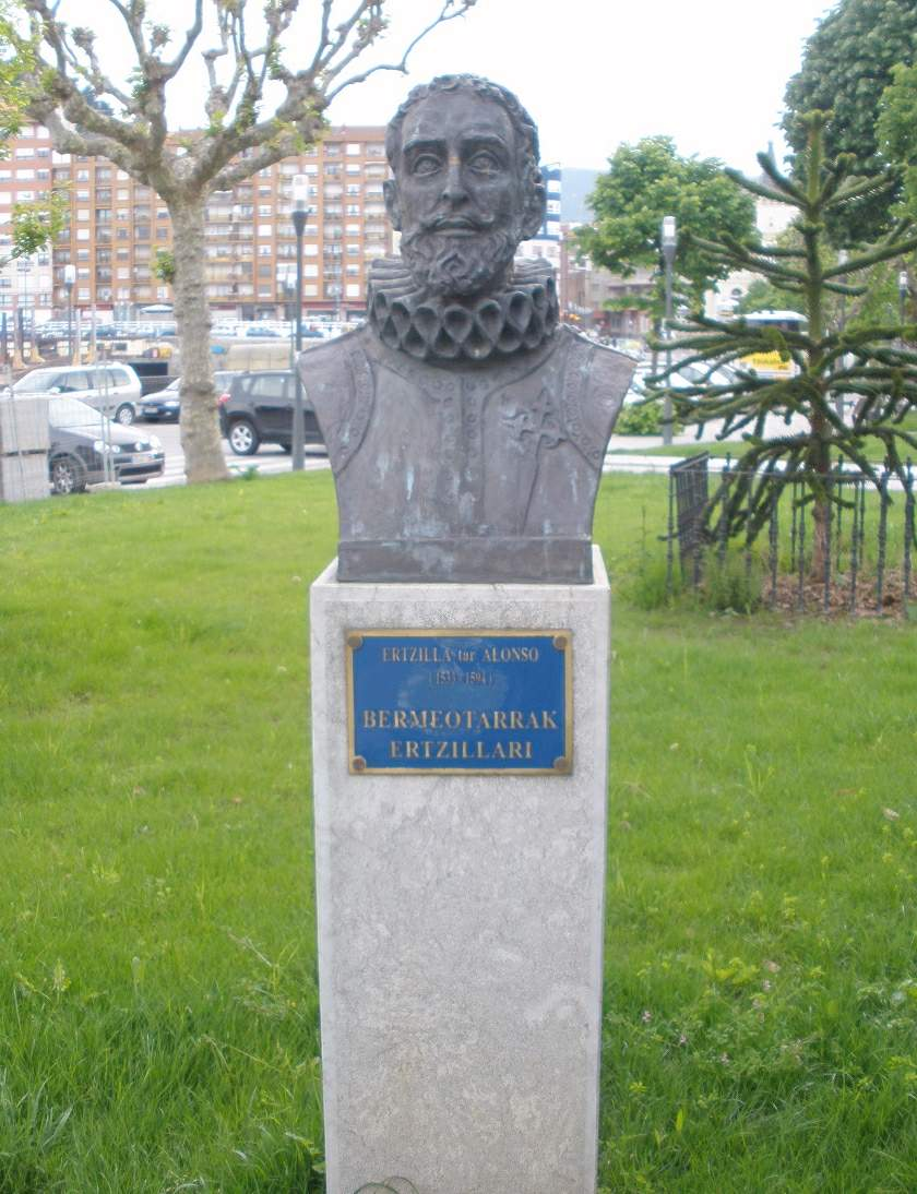 Monumento al poeta Alonso de Ercilla en Bermeo (Vizcaya)